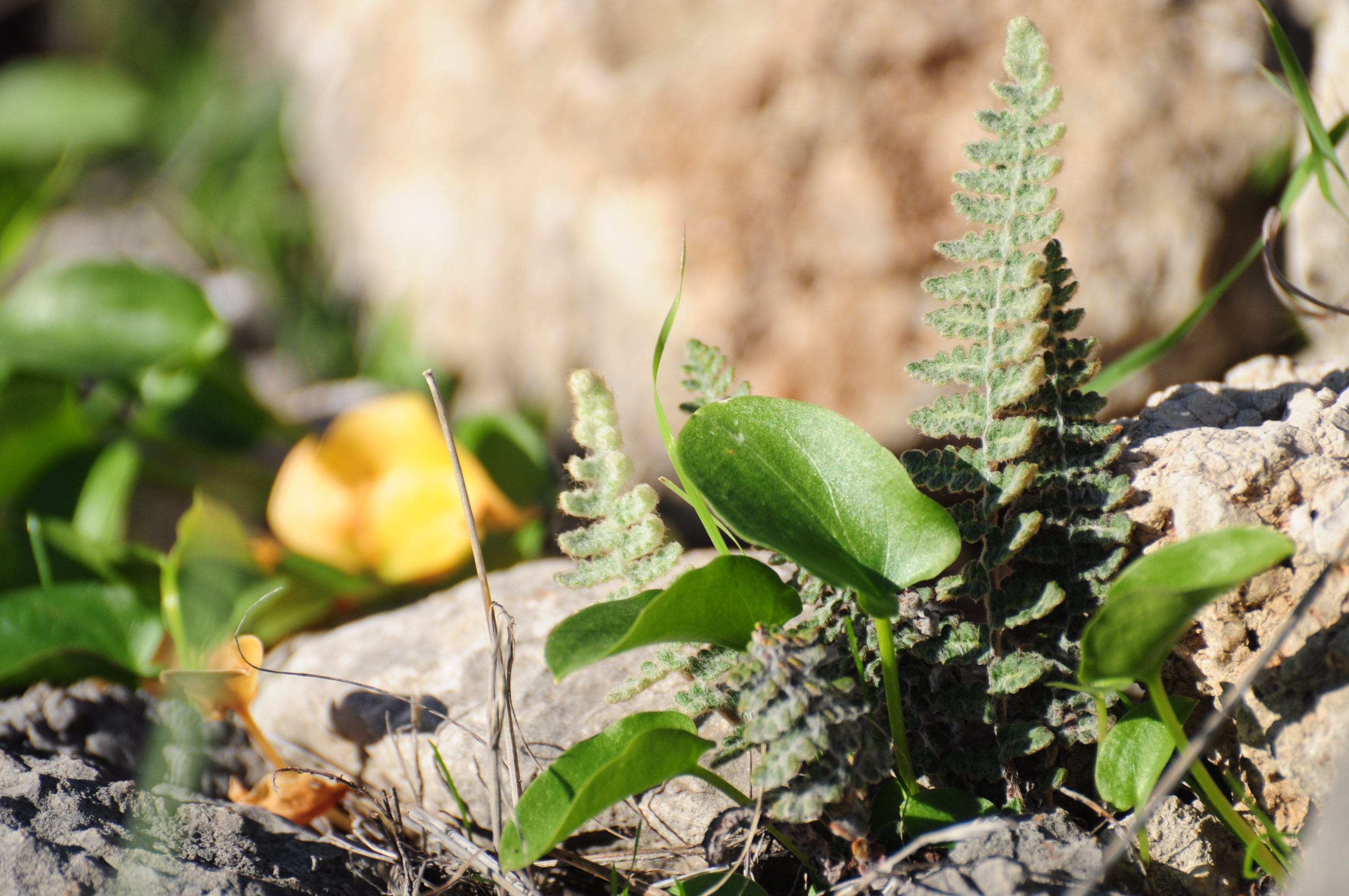 Cosentinia vellea en la Sierra de Esparteros, Morón de la Frontera, Sevilla